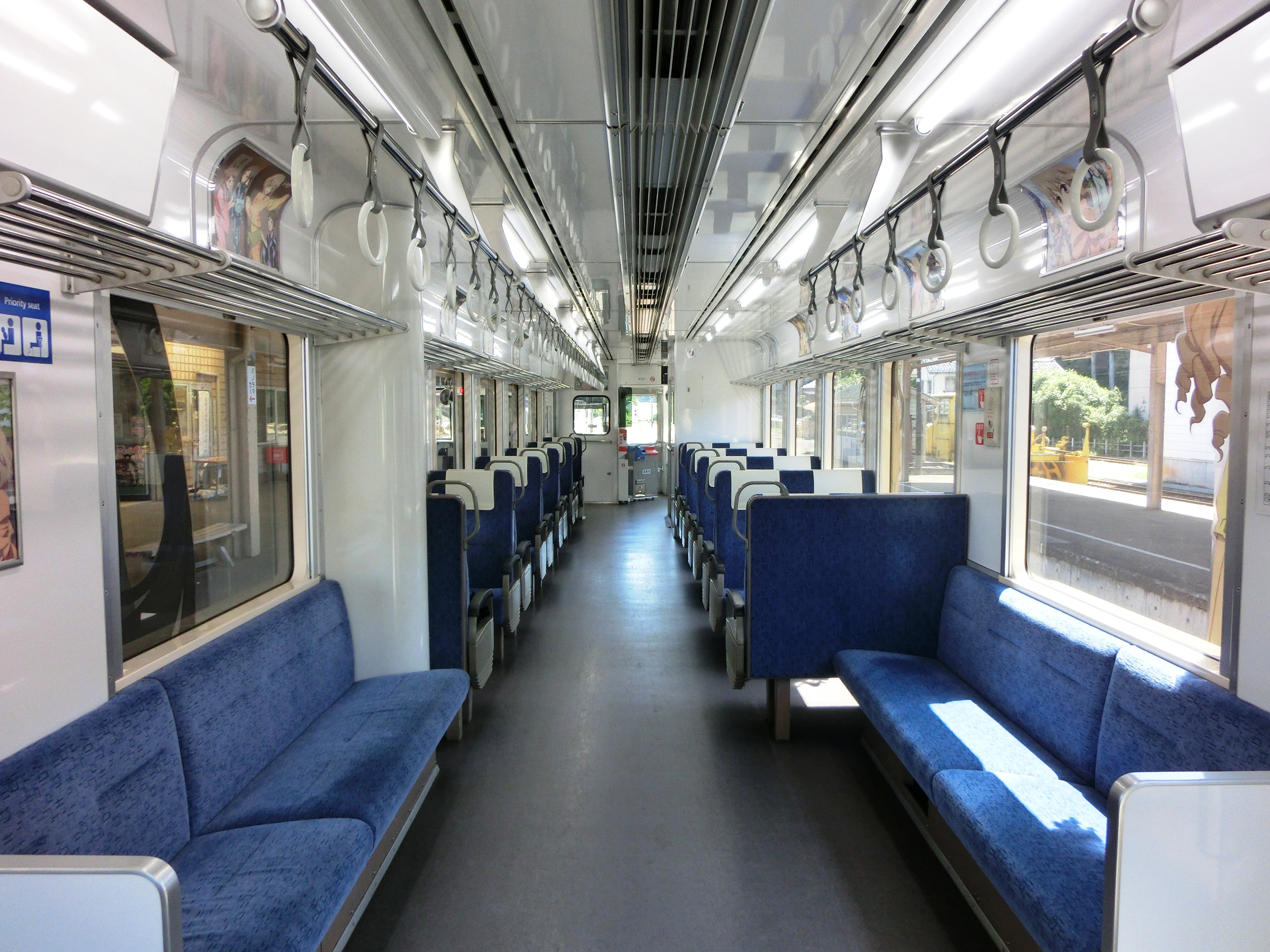 のと鉄道NT200形気動車のNT201号車の車内。穴水駅にて撮影。